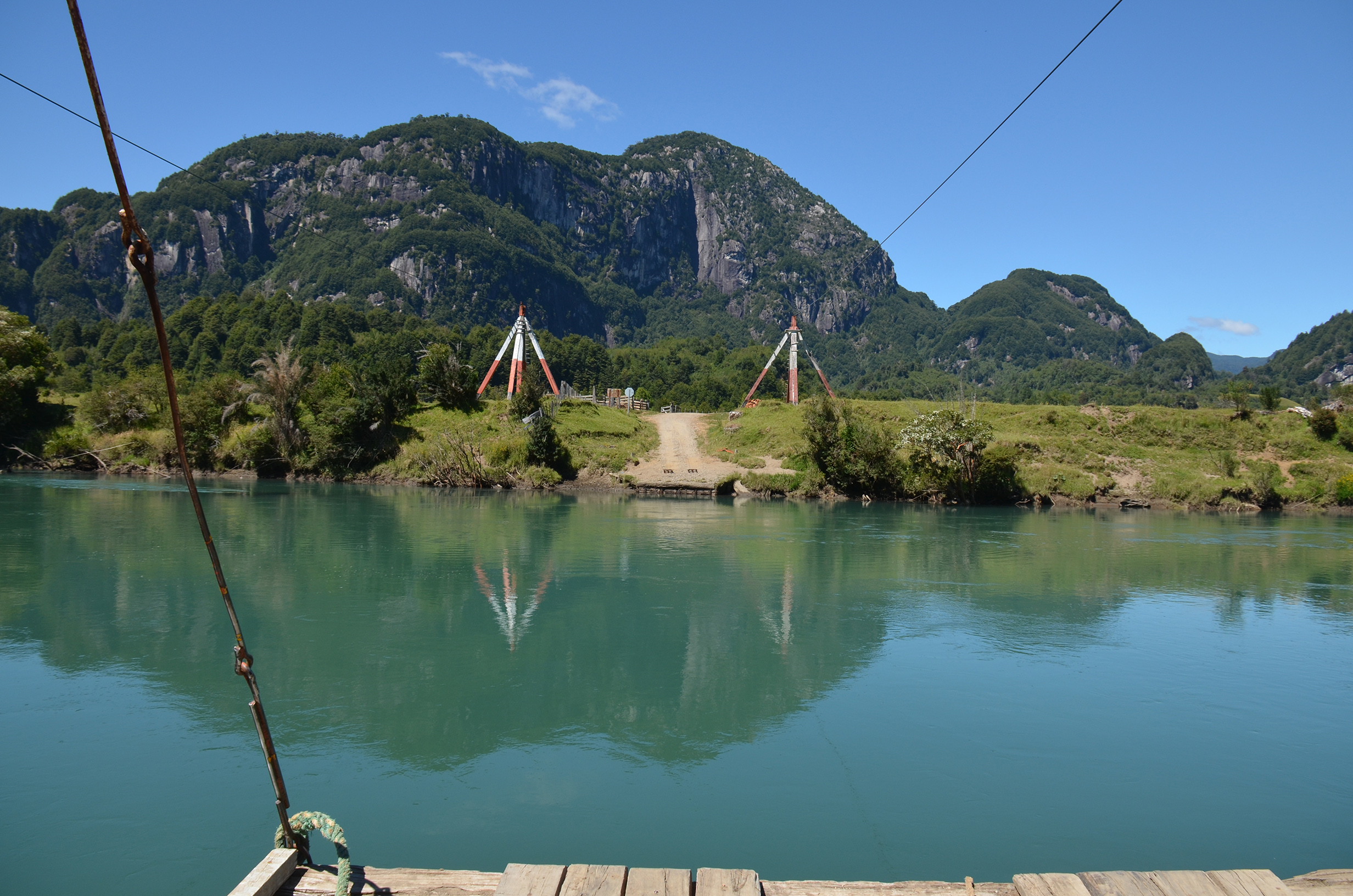 Río Blanco (Oeste)